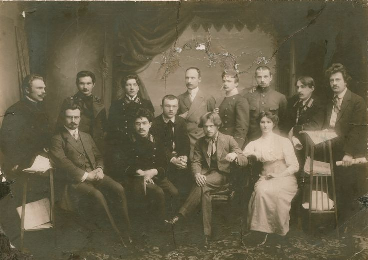 Grupė lietuvių inteligentų Maskvoje. Fotoateljė interjere iš kairės (sėdi): Kazys Pietaris, Romas Bytautas, Petras Klimas, Stasys Šilingas, Agnietė Ambraziejūtė. Stovi: Rapolas Skipitis, Stasys Naginskas, Vladas Bukaveckas, Antanas Vienuolis (Žukauskas), Juozas Papečkys, Marcinkus, Juozas Nemeikša, Bytautas.